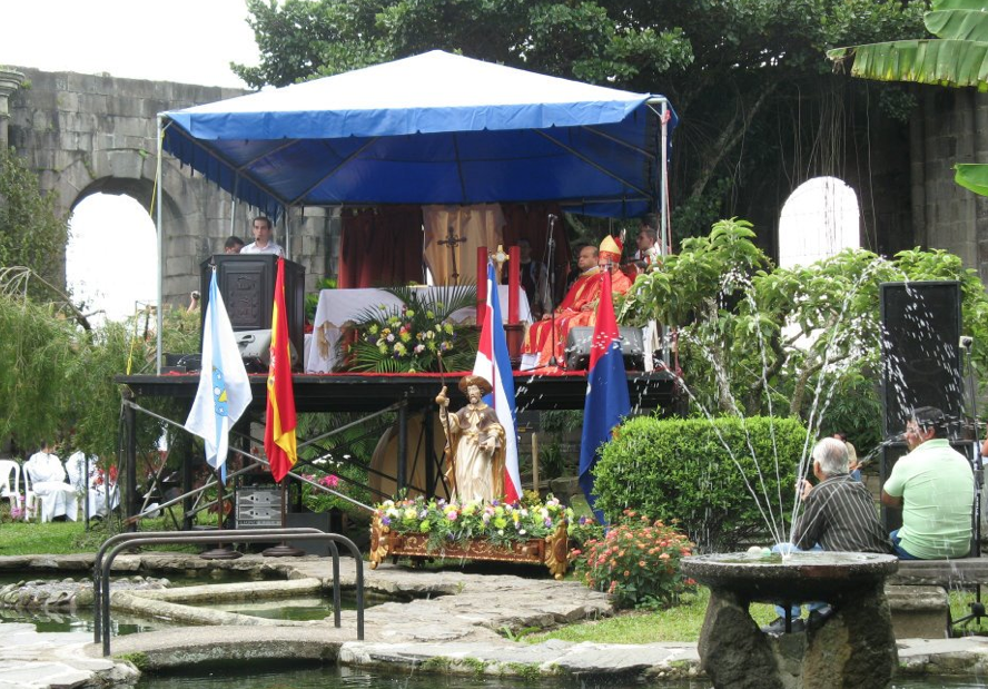 Celebración de Santiago Apostol en Costa Rica